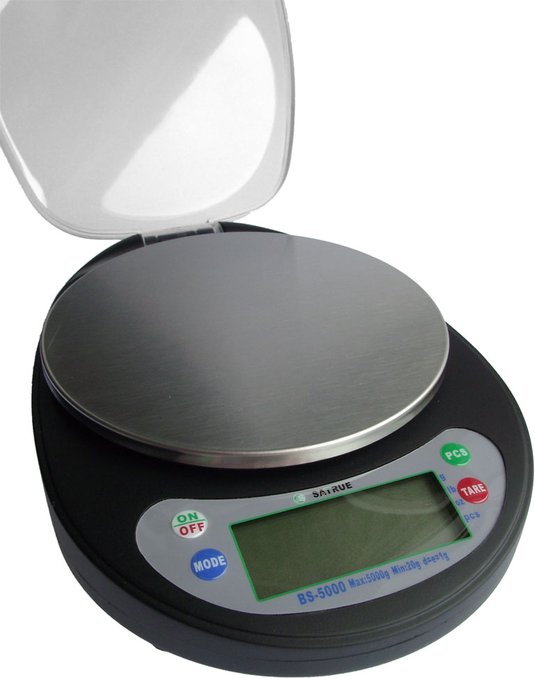 GNU-FDL, selbst fotografiert